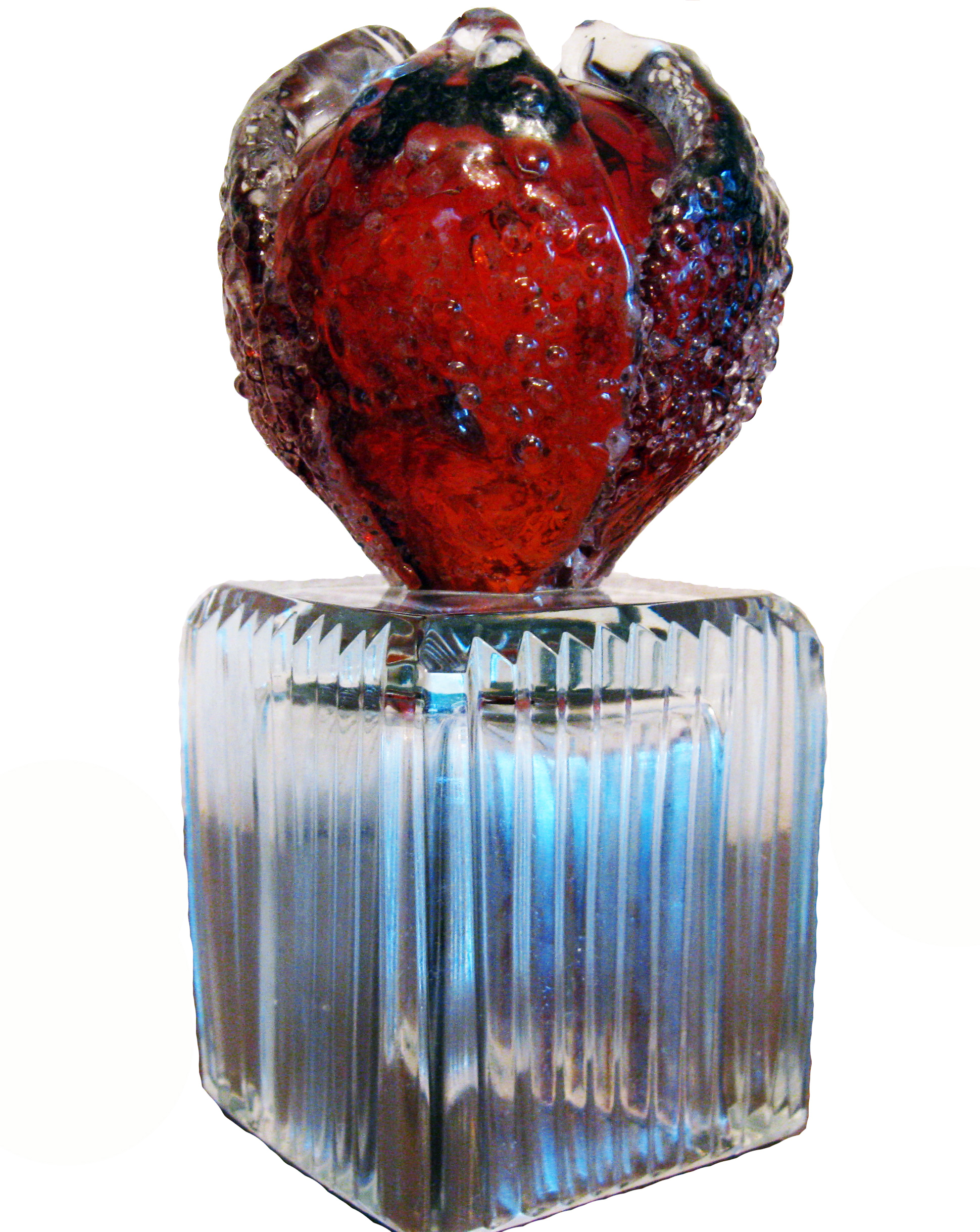 Кришталевий каштан (приз Радо-Рокс Україна, 1995)